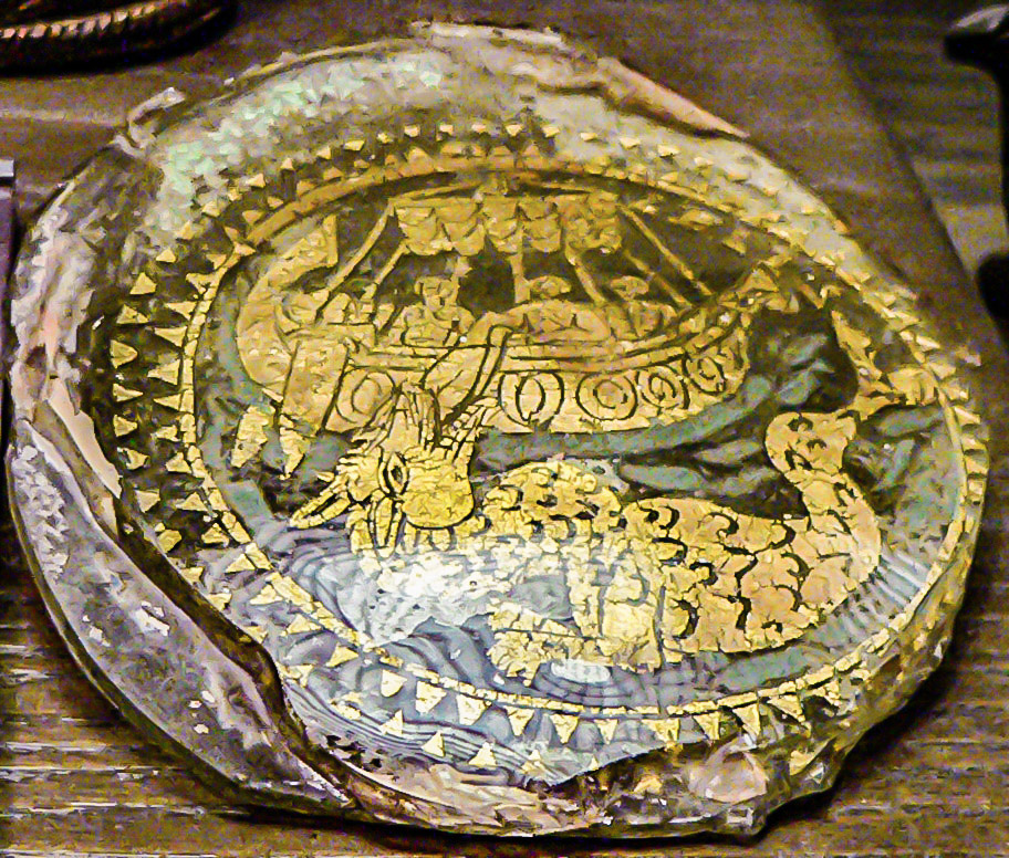 Fond de verre doré. Représentation de Jonas et la baleine Diam.: 10,5 cm IV° siècle Musée du Louvre, N° Inv. S 2053